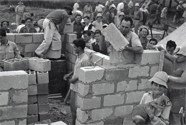 "יקום" - יום העליה